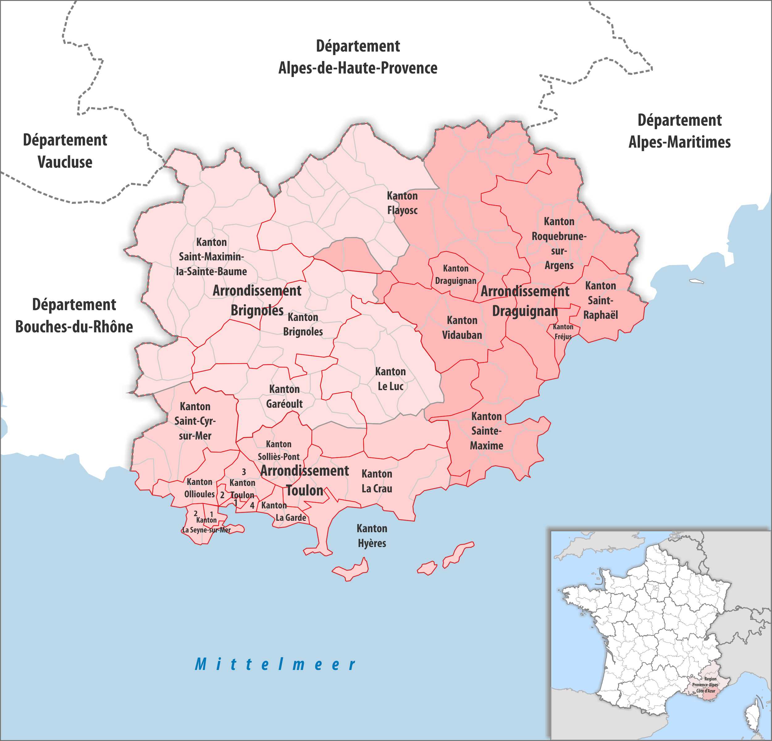 Gemeinden, Kantone und Arrondissemente im Departement Var